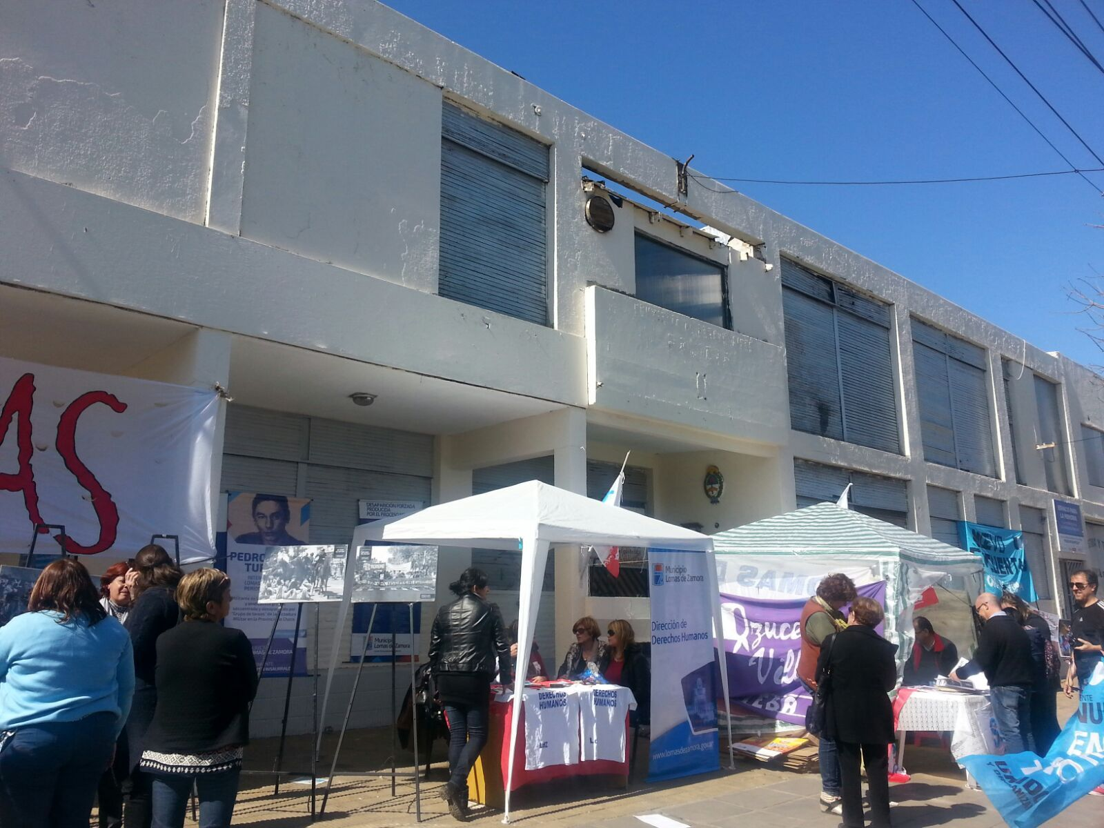 Acto por el 39º aniversario de La noche de los Lápices en el Pozo de Banfield.